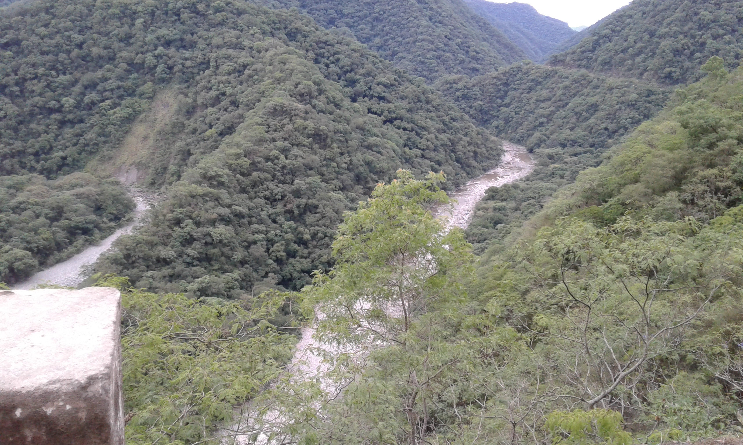 Escaba un lugar del sur tucumano conformado por un paisaje de cerros y un Rio: Escaba (constituido por la union de los rios Singuil y arroyo Chavarria)